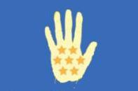 Флаг Королевства Лоанго